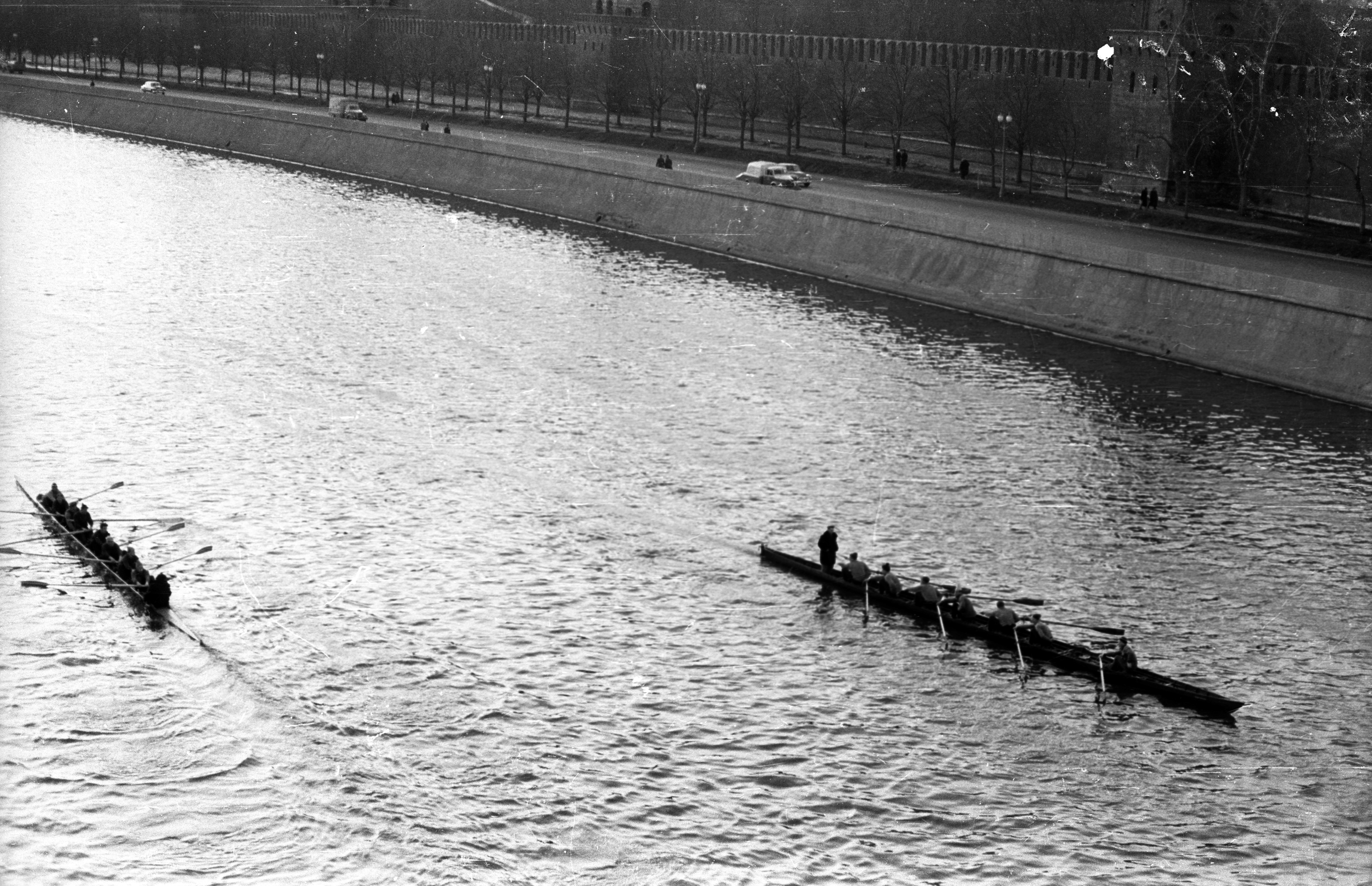 evezősök a Moszkva folyón, háttérben a Kreml. Location: Russia, Moscow Tags: Soviet Union, paddling Title: evezősök a Moszkva folyón, háttérben a Kreml.